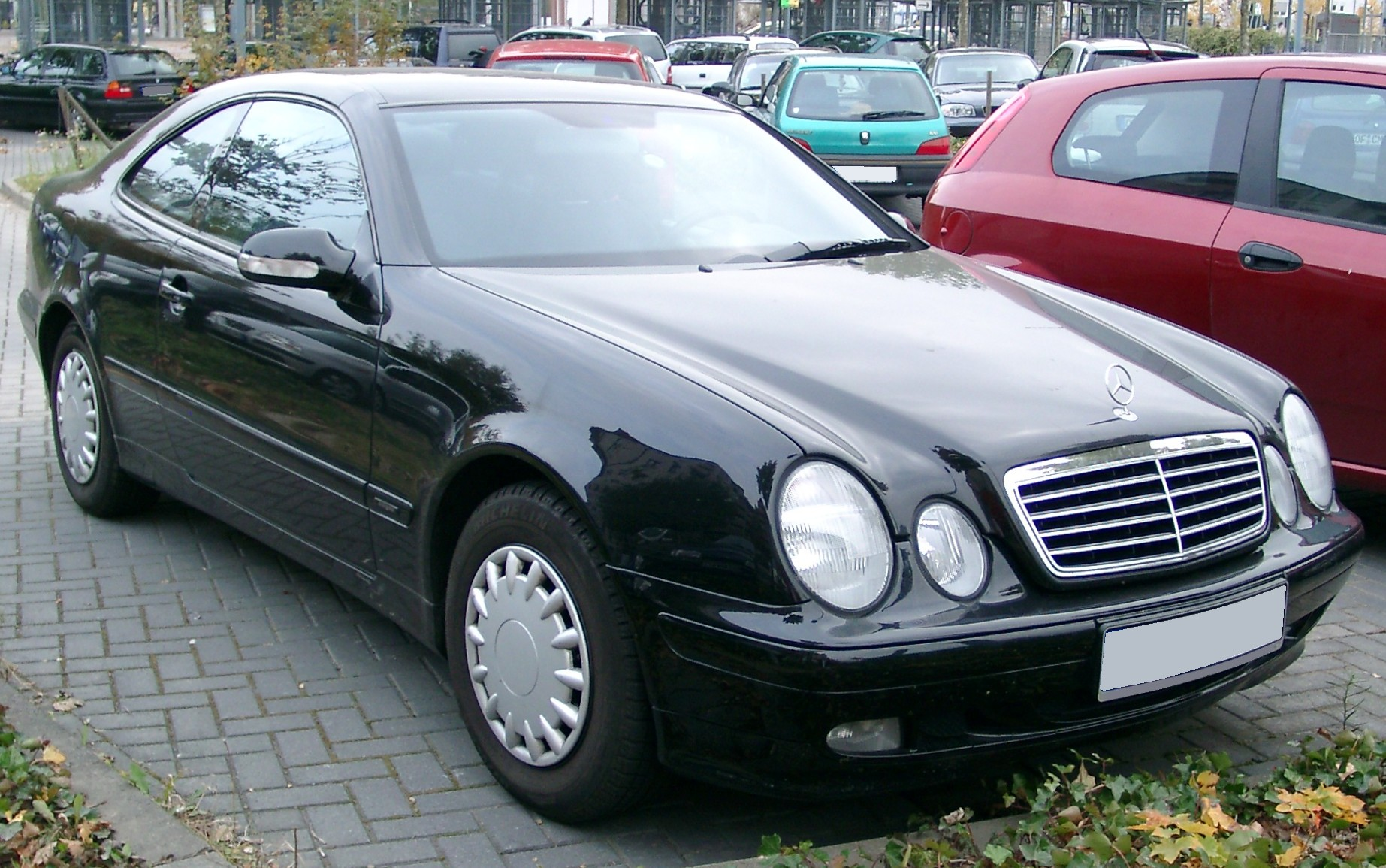 Mercedes-Benz W208 (Mercedes CLK)